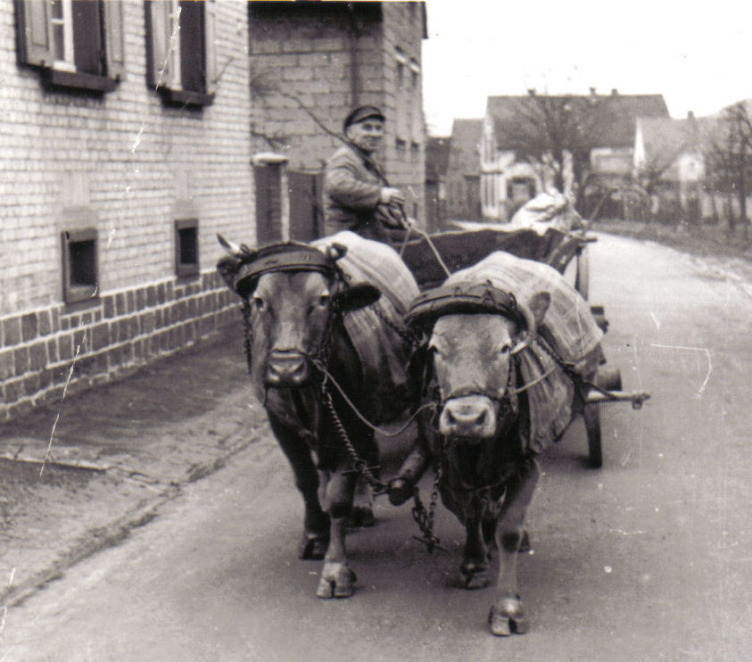 1956 Jakob Eller mit seinem Kuhfuhrwerk in der Thomasstraße - views of Alsenborn in Rhineland-Palatinate, Germany